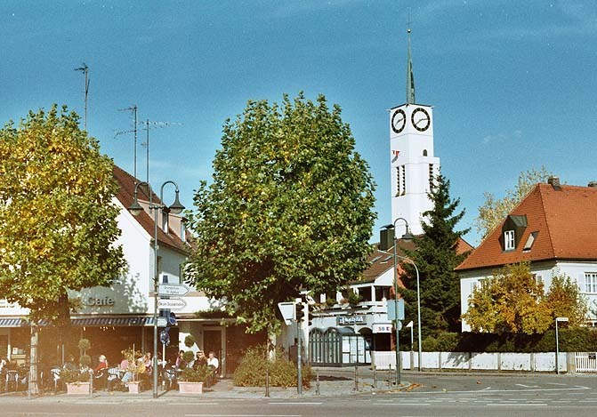 Foto von Neusäß (Eiscafe und der Turm von St. Ägidius)